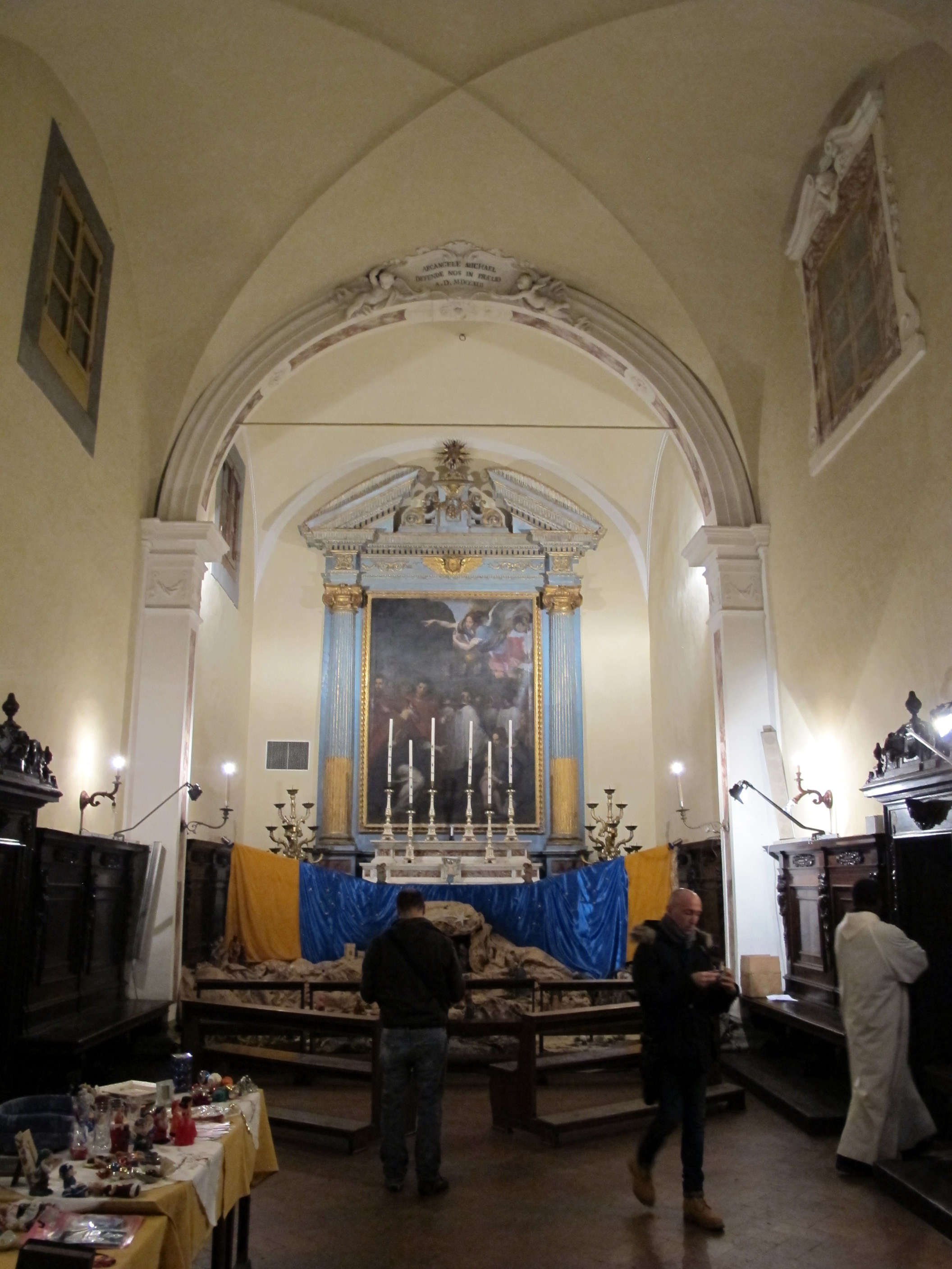 San michele a pontorme, oratorio